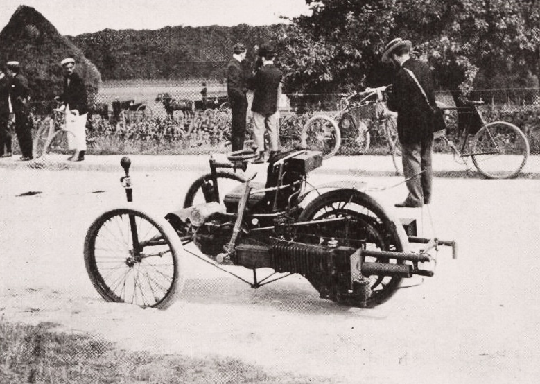 La voiturette à pétrole de Paul Jamin, au Paris-Trouville 1897 - Le Sport universel illustré du 28 août 1897, p.445